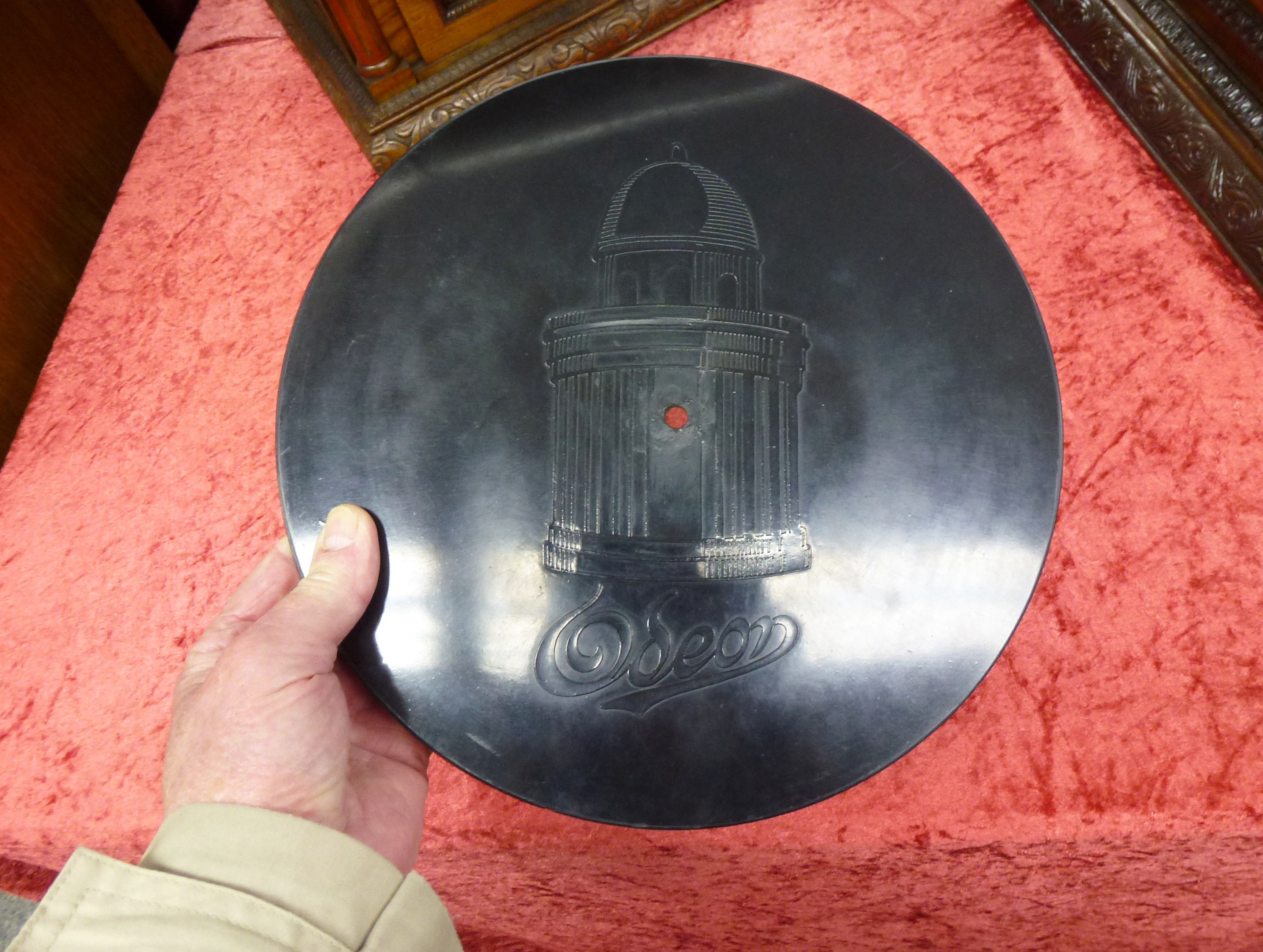 Phonomuseum "Alte Schule" in Holzdorf